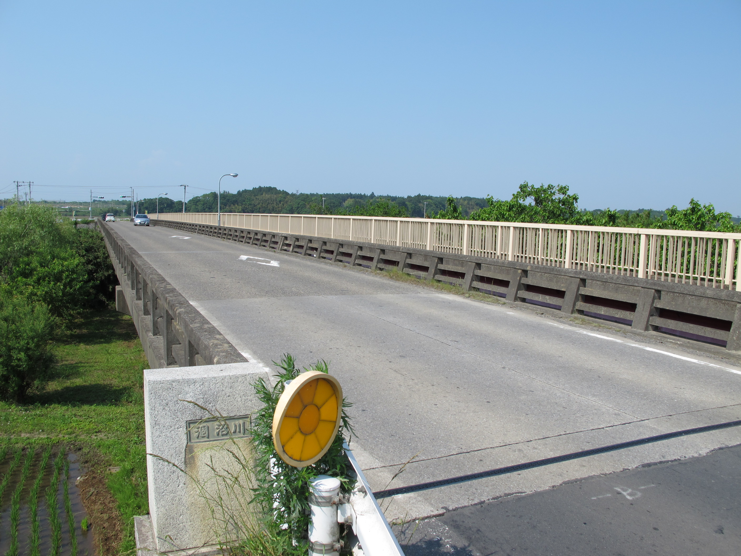 川根大橋（茨城県道59号玉里水戸線）